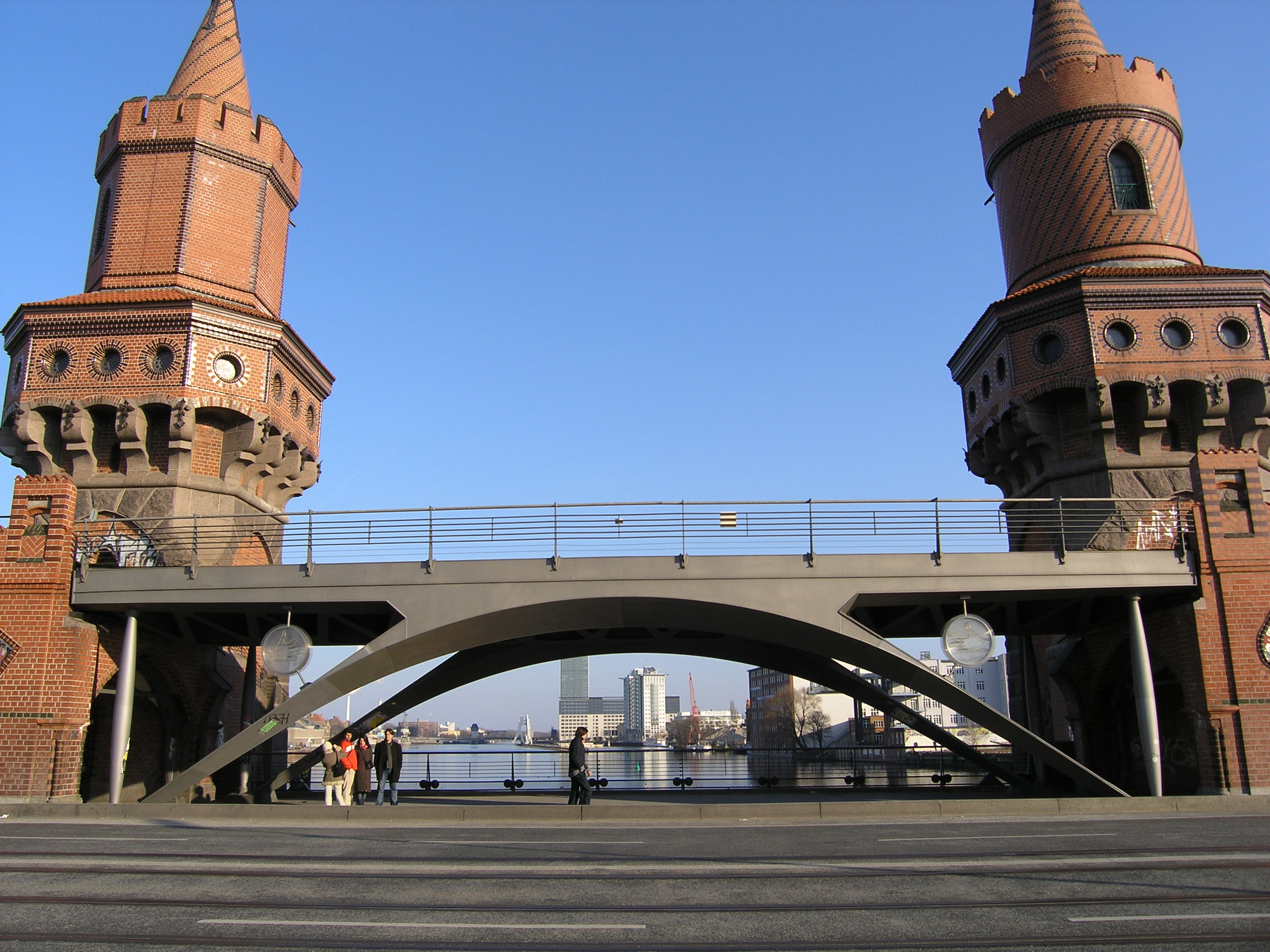 Oberbaumbrücke, Ergänzung des fehlenden Mittelteils durch Santiago Calatrava